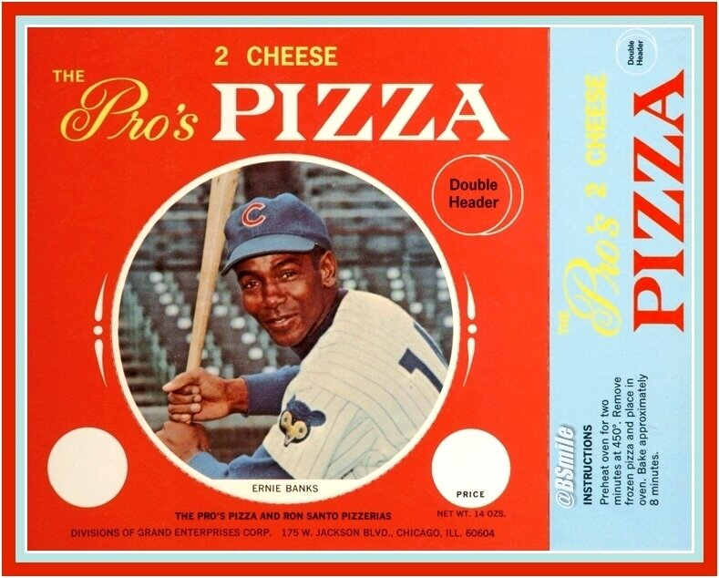 1967 Pro's Pizza Ernie Banks